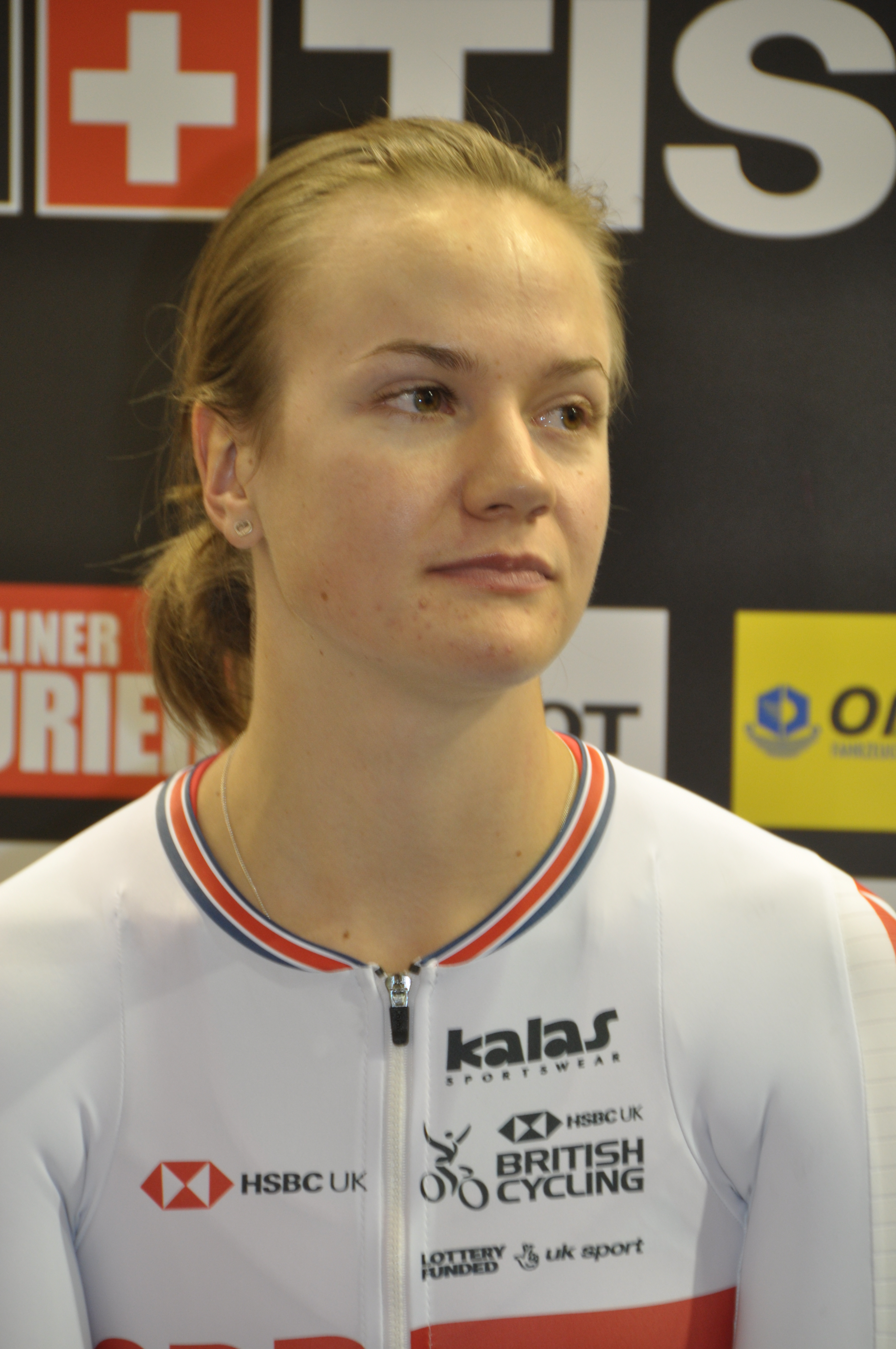 Jessica Roberts, britische Radsportlerin